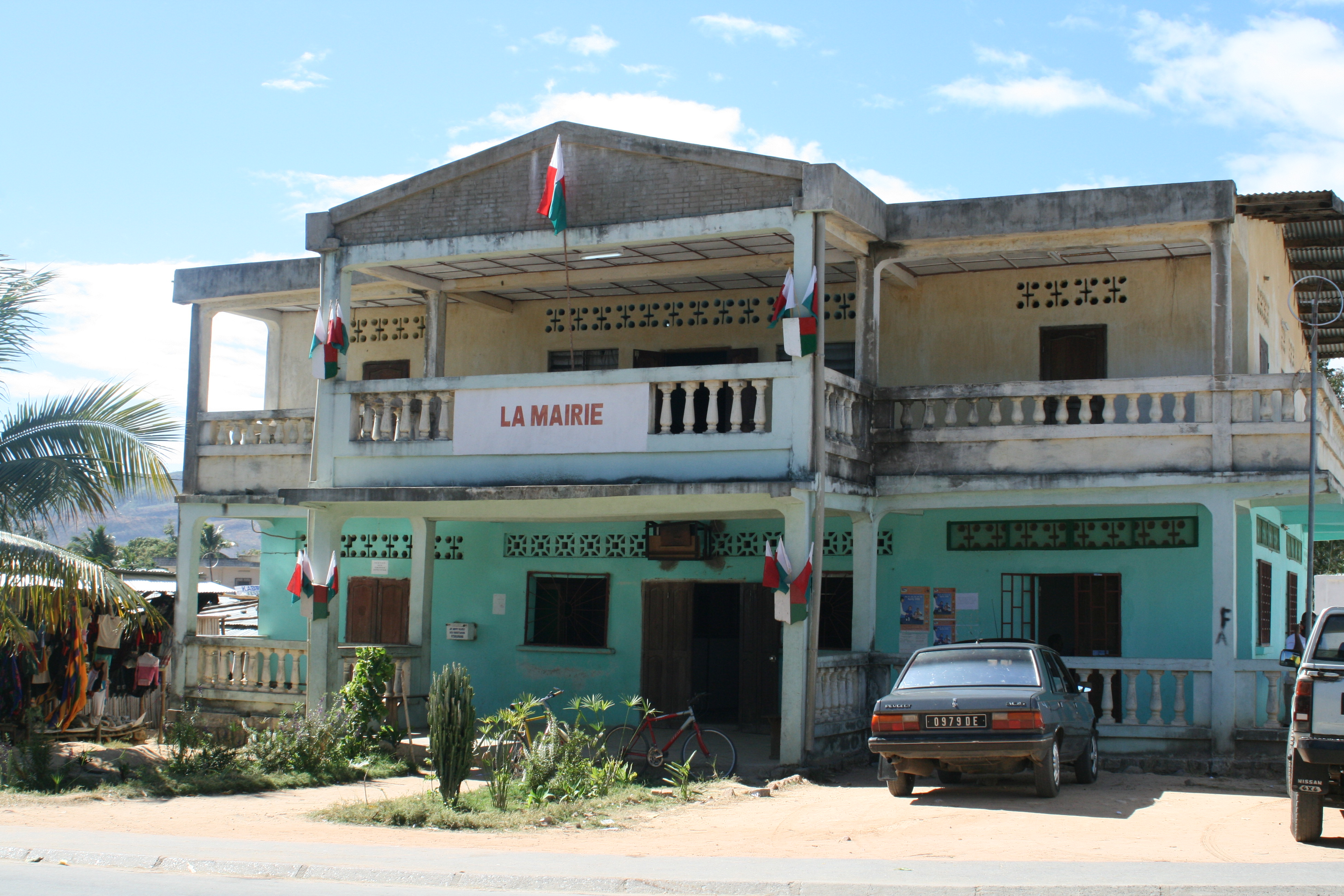 Mairie de la commune de Ambilobe